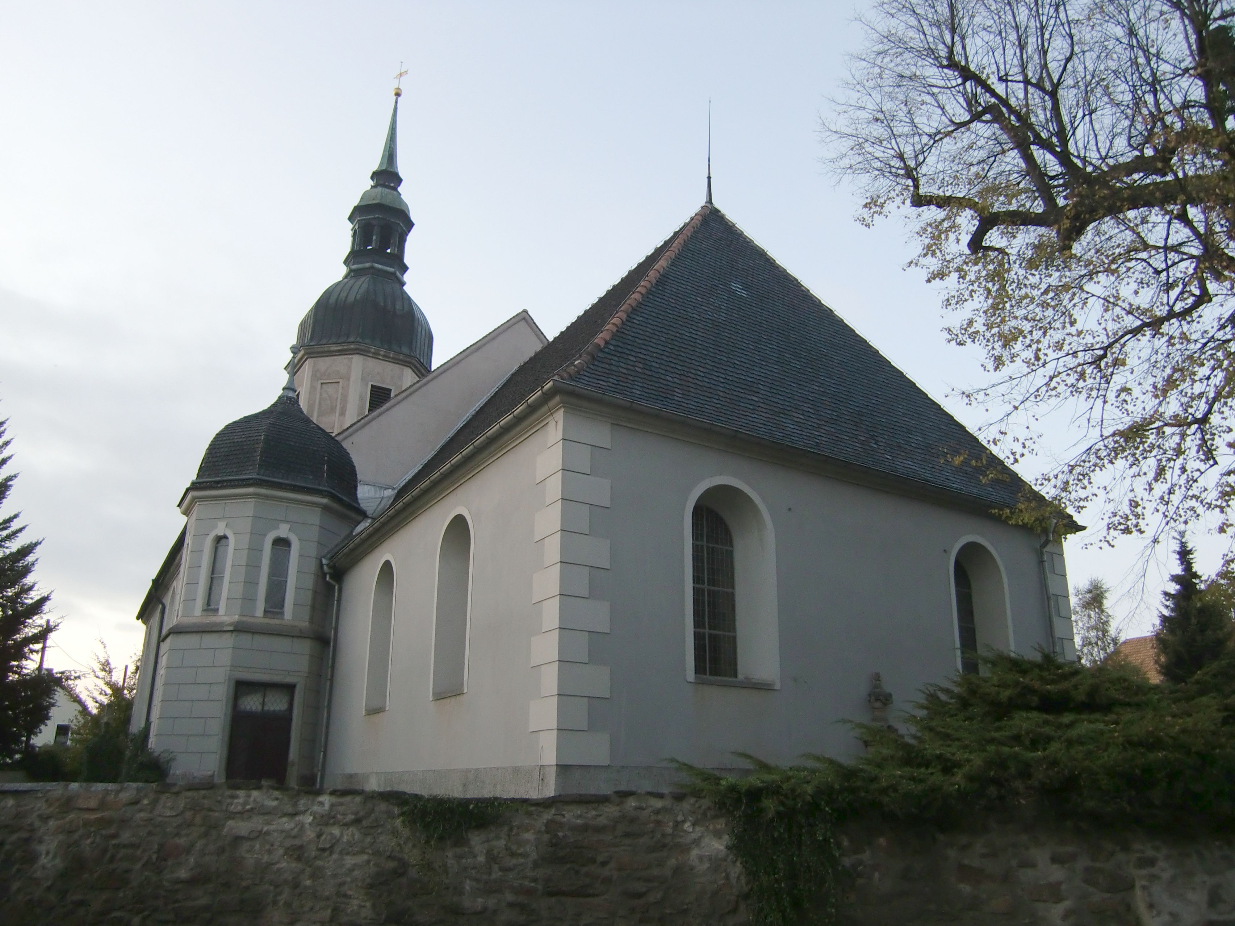 Kirche Klix, Südostansicht Hornjoserbsce: Napohlad Klukšanskeje cyrkwje wot juhowuchoda.